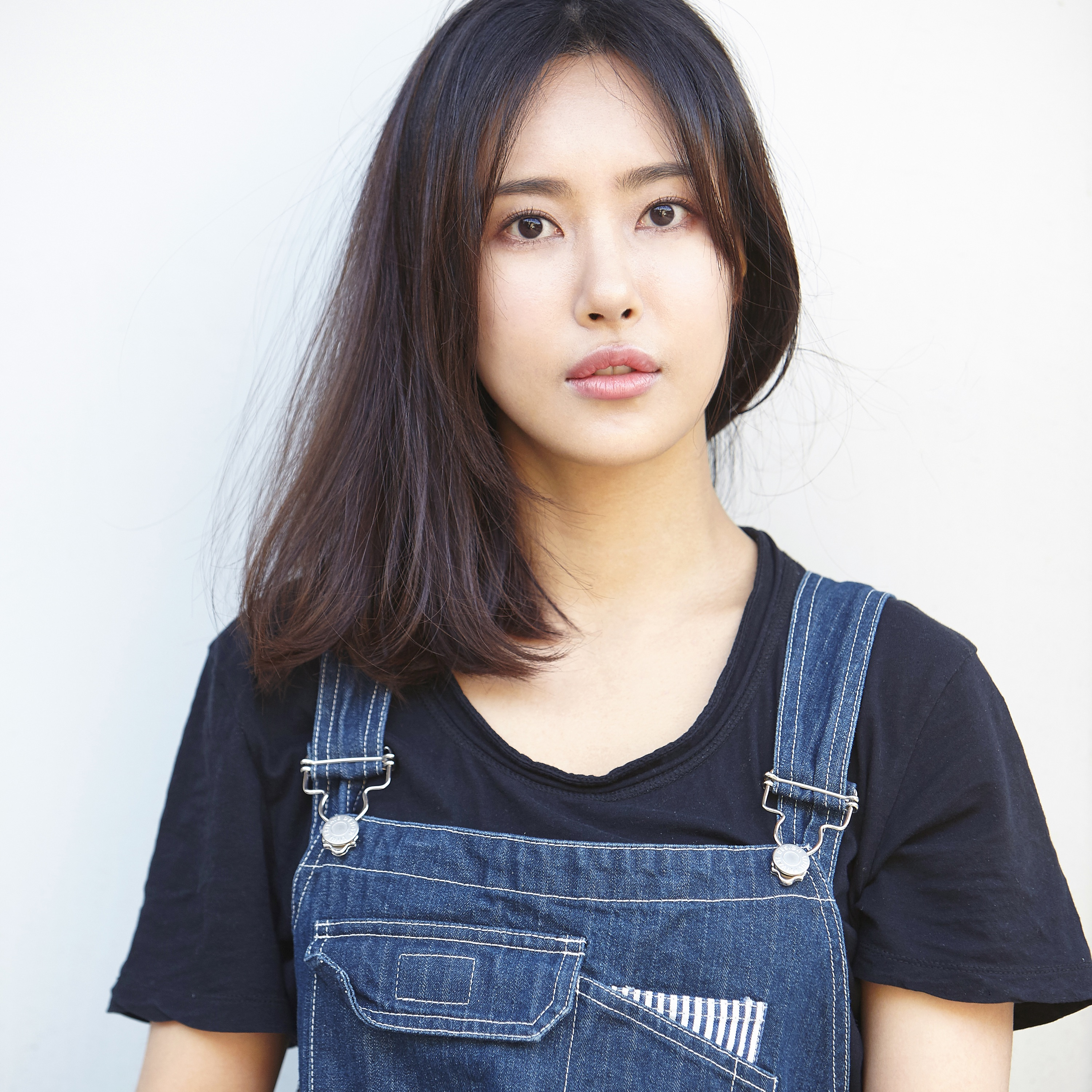 Profile